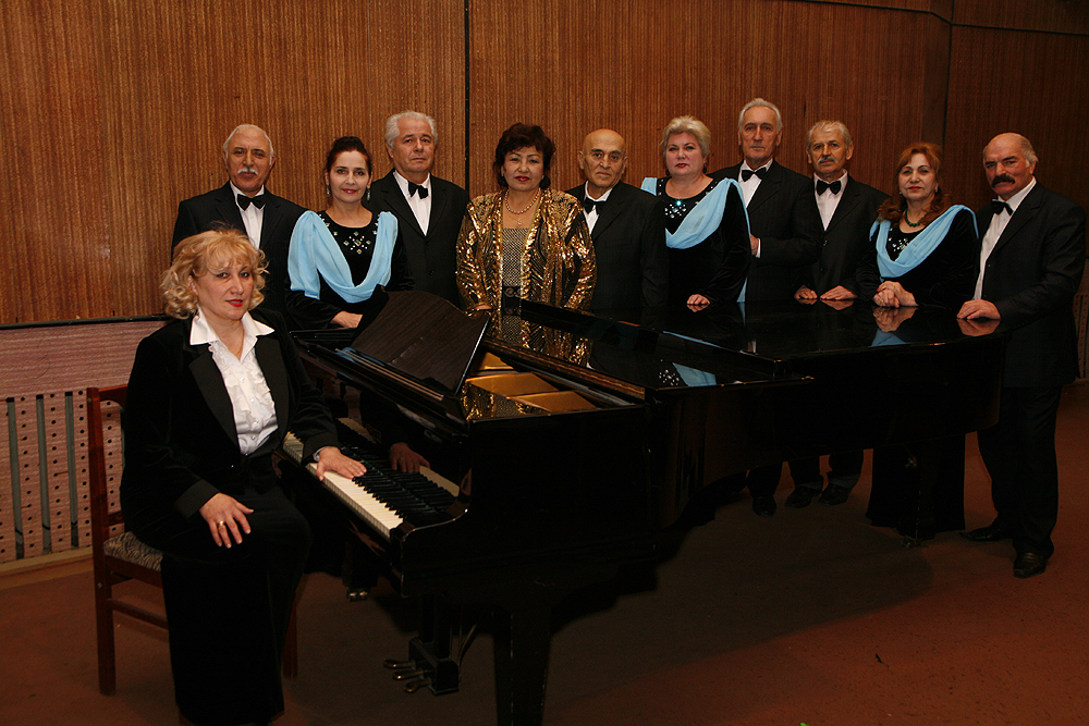 солисты Госхора Дагестана